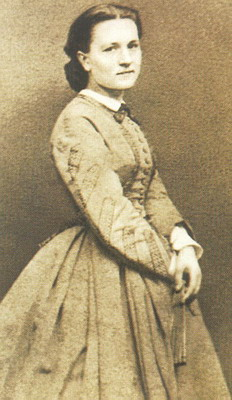 Полина Тургенева, ( в замужестве Брюэр), (1842-1919), дочь писателя Полина (Пелагея) Тургенева, по мужу Брюэр (1842-1919)- дочь писателя от белошвейки Авдотьи Ермолаевны Ивановой. Родилась в Москве в мае 1842 года. Жила до 8 лет у Варвары Петровны Тургеневой, также и в доме на Остоженке. И.С. Тургенев, стремясь избавить девочку от тягот ее «ложного положения», отправляет Полину во Францию. Она воспитывается сначала в семье Полины и Луи Виардо, затем во французском пансионе. Тургенев дал дочери свою фамилию. Полина вышла замуж за Гастона Брюэра, владельца стекольной фабрики. Брак был неудачным.